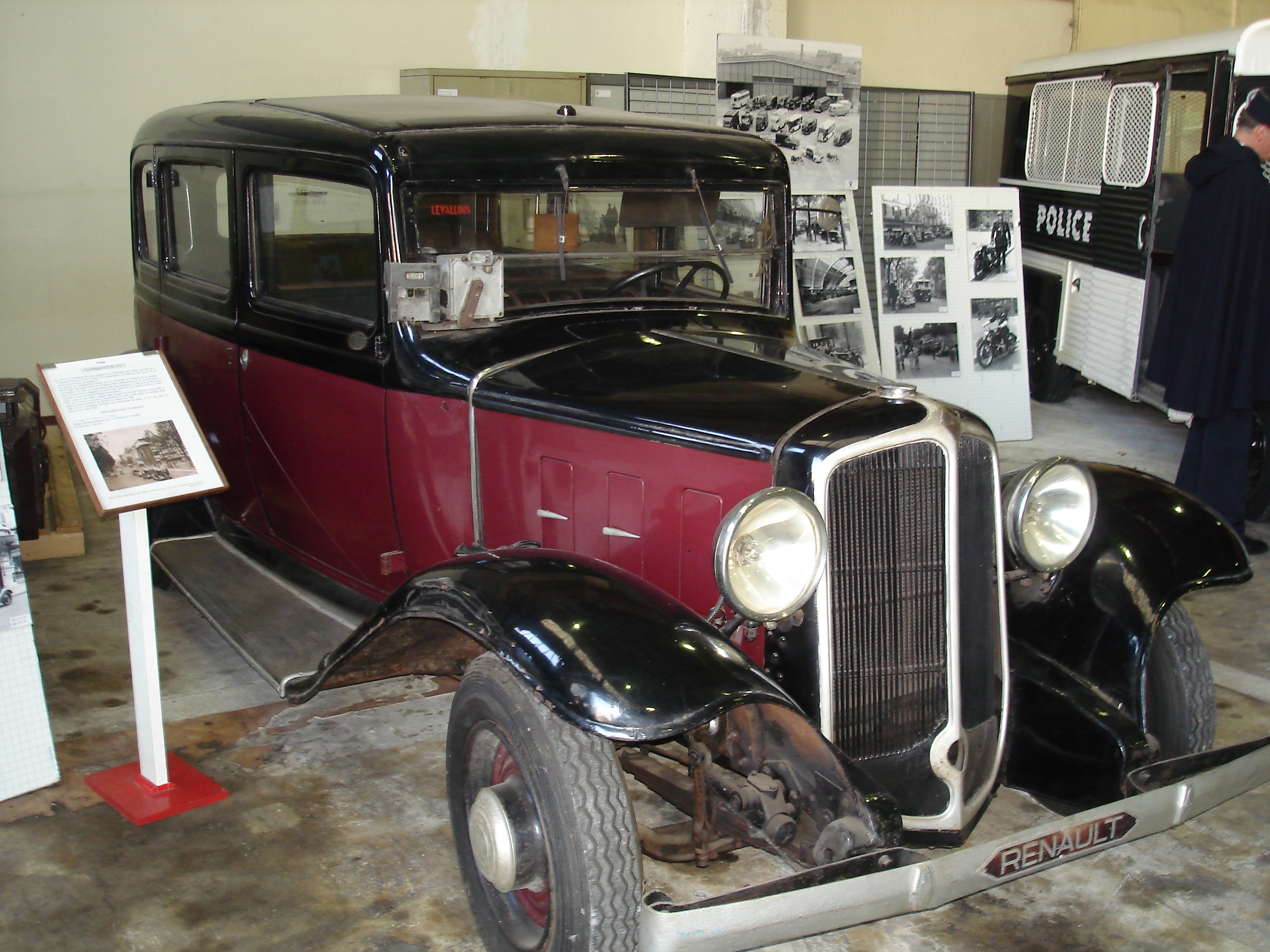 Taxi Renault KZ 11 Taxi de 1933 lors des Journées du patrimoine AMTUIR.